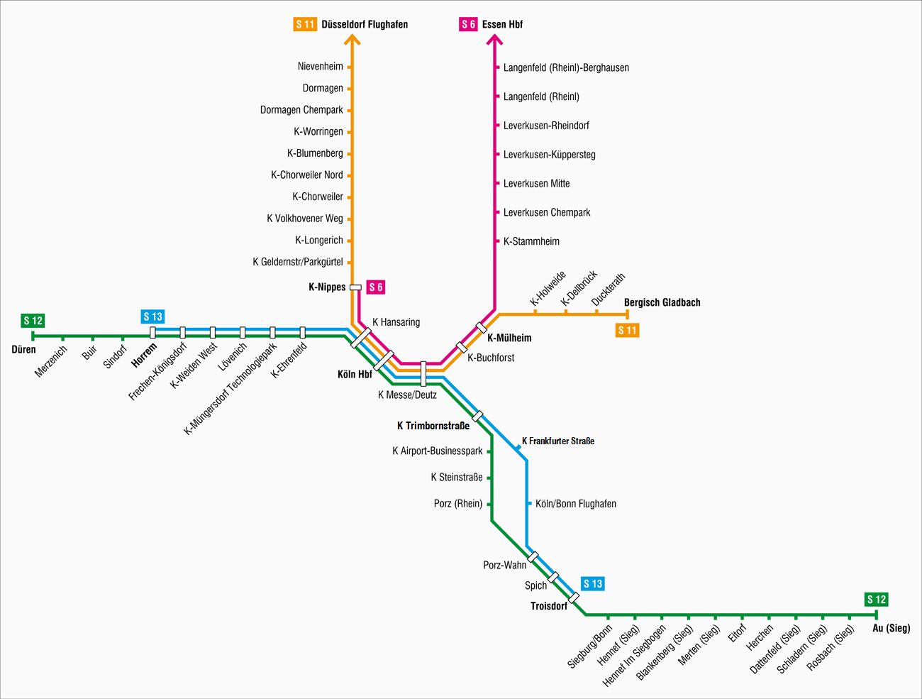 Karte der S-Bahn Köln. Quelle: [1]